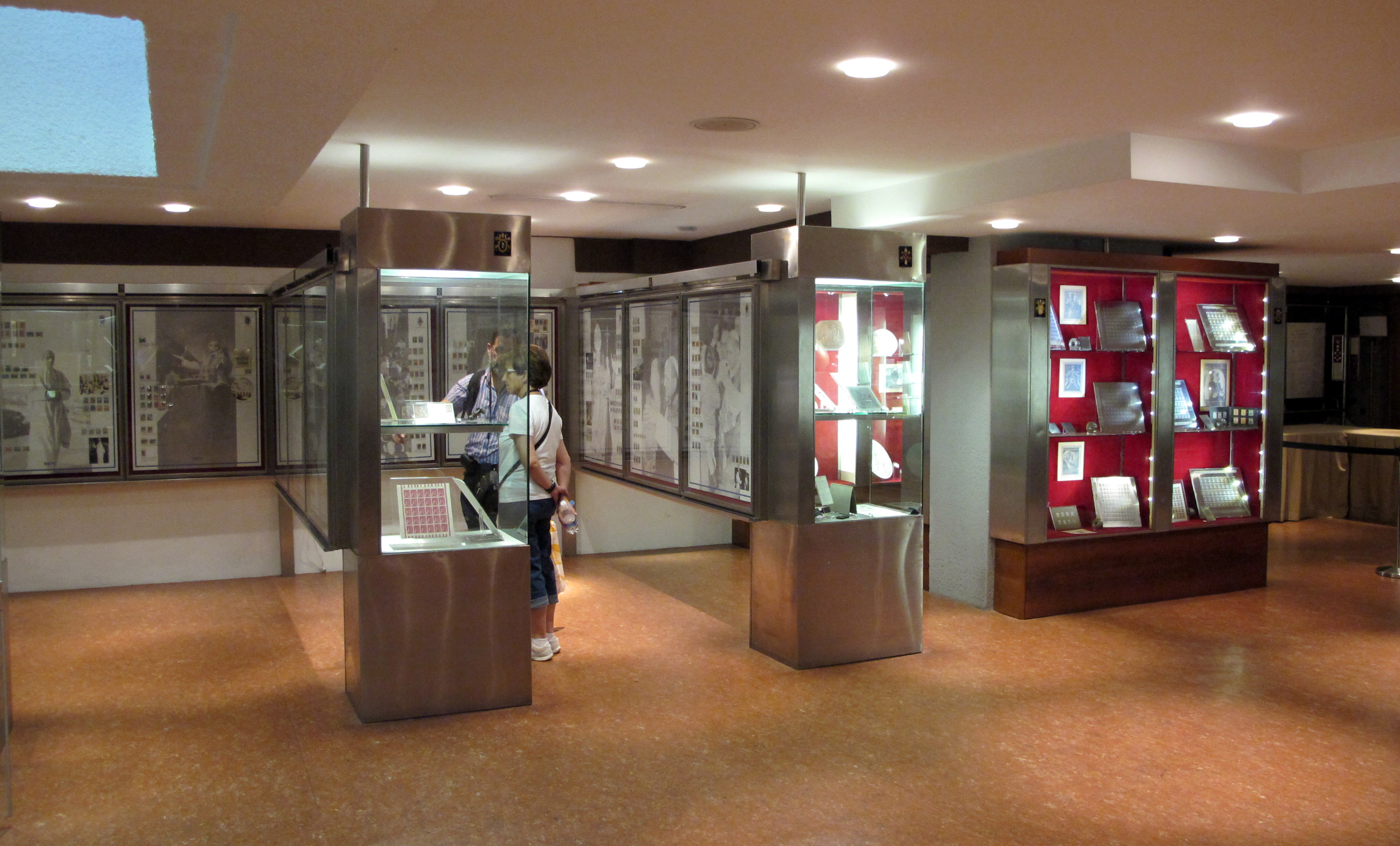 Musei Vaticani